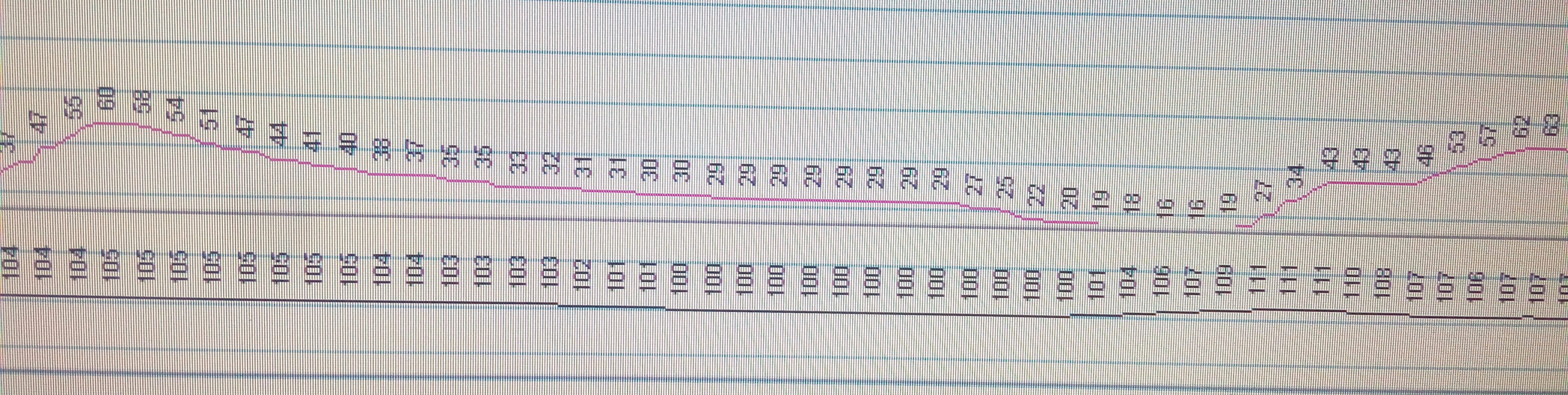 Քնի օբստրուկտիվ ապնոէով տառապող անհատի արյան մեջ թթվածնի մակարդակի (վարդագույն գծով) և սրտի զարկերի քանակի (սև գծով) դինամիկան գիշերը քնած ժամանակ, որոշված պոլիսոմնոգրաֆիայի (բազմաքնագրություն) ընթացքում պուլսօքսիմետրով։ Արյան մեջ թթվածնի մակարդակի (սատուրացիա) նորման առողջ մարդու համար համարվում է 95% և ավելին։ Այստեղ տեսնում են սատուրացիայի անկում մինչ 16%, ինչը նշանակում է ամբողջ օրգանիզմի խորը թթվածնաքաղց և հետևաբար սրտի զարկերի հաճախացում մինչև 111 զարկ/րոպե (միջին նորման 75 զարկ/րոպե)։